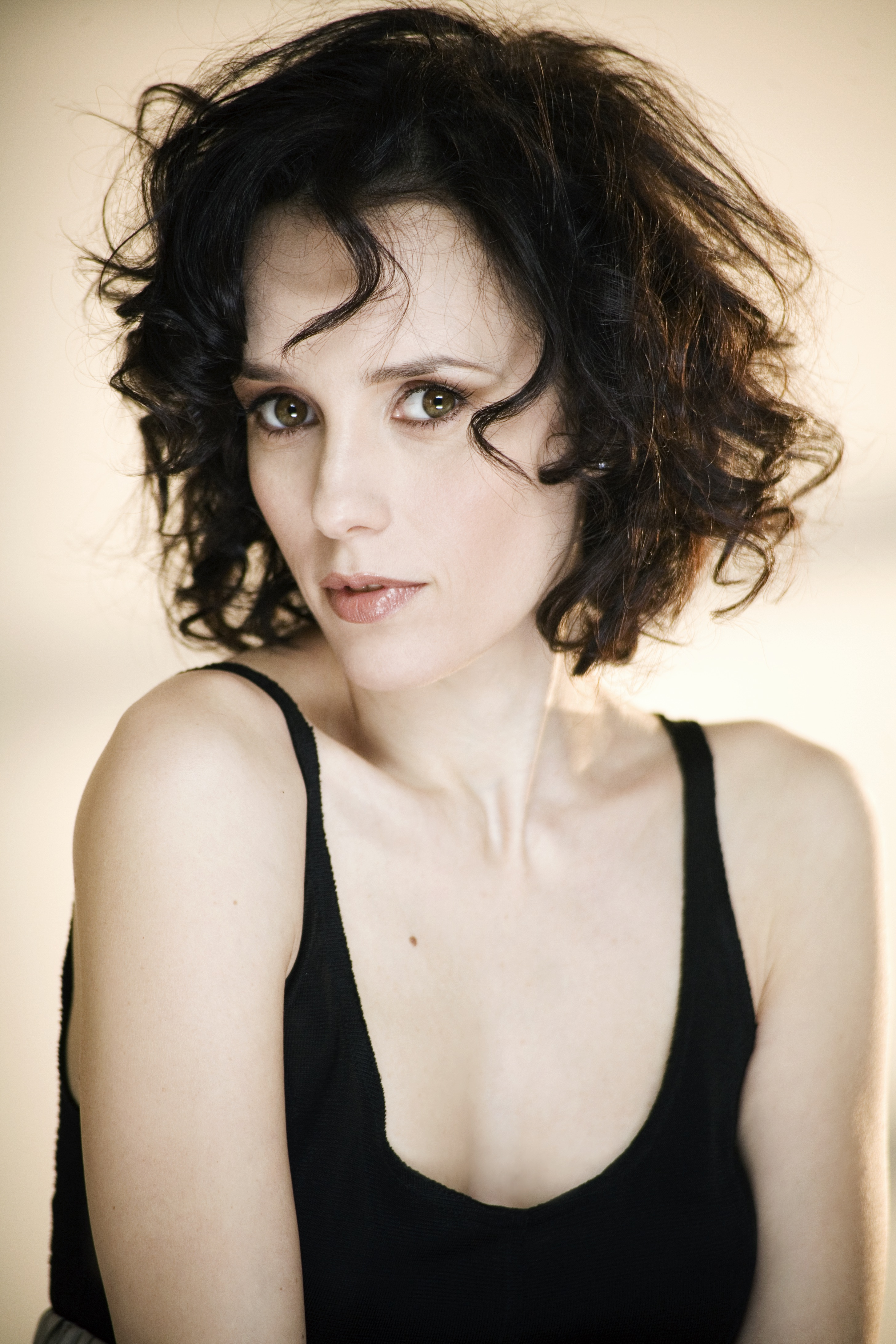 Daniela Piazza foto